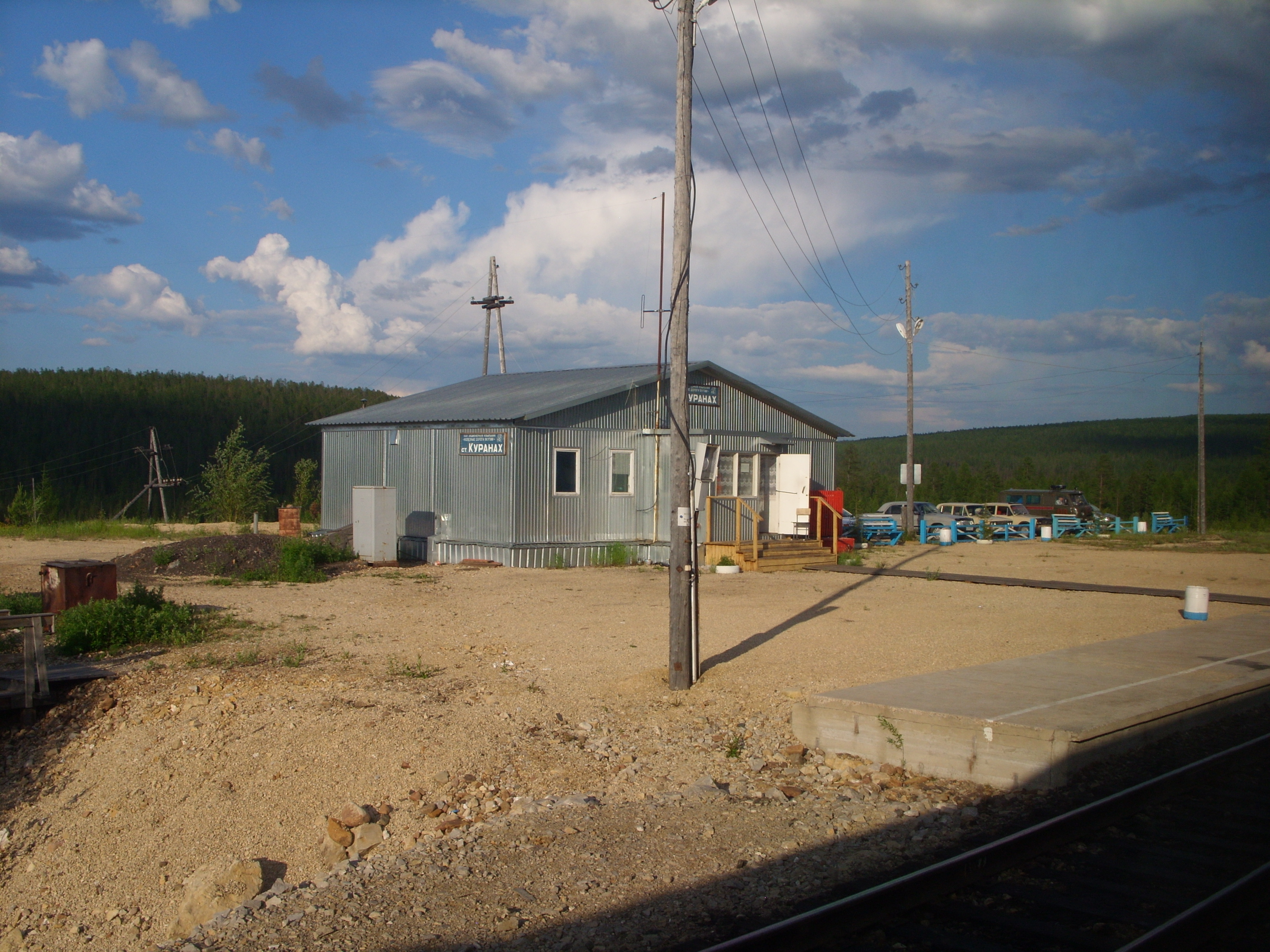 Железнодорожная станция Куранах